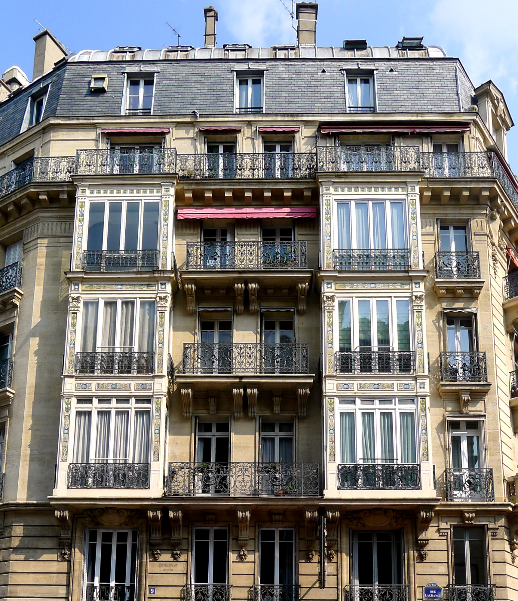 Rue Lagrange (n°9) - Paris V Un exemple des premiers oriel-windows de Paris autorisés par le décret du 22 juillet 1882 qui permet une saillie de 0,50 m à 4 m du sol, et de 0,80 m à 5,75 m. Ces extensions doivent être démontables, c'est-à-dire en bois ou en métal et ne peuvent être mis en place qu'entre le second étage, généralement souligné par un balcon filant, et la corniche qu'elles ne peuvent dépasser.